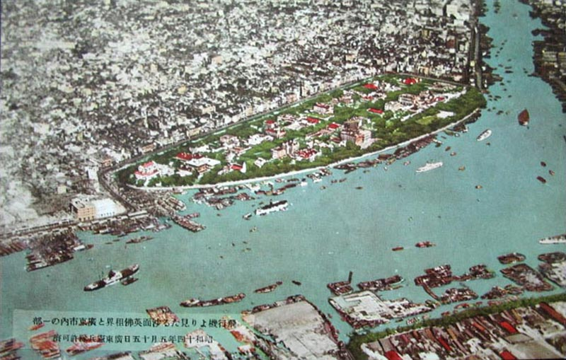 廣州市沙面島